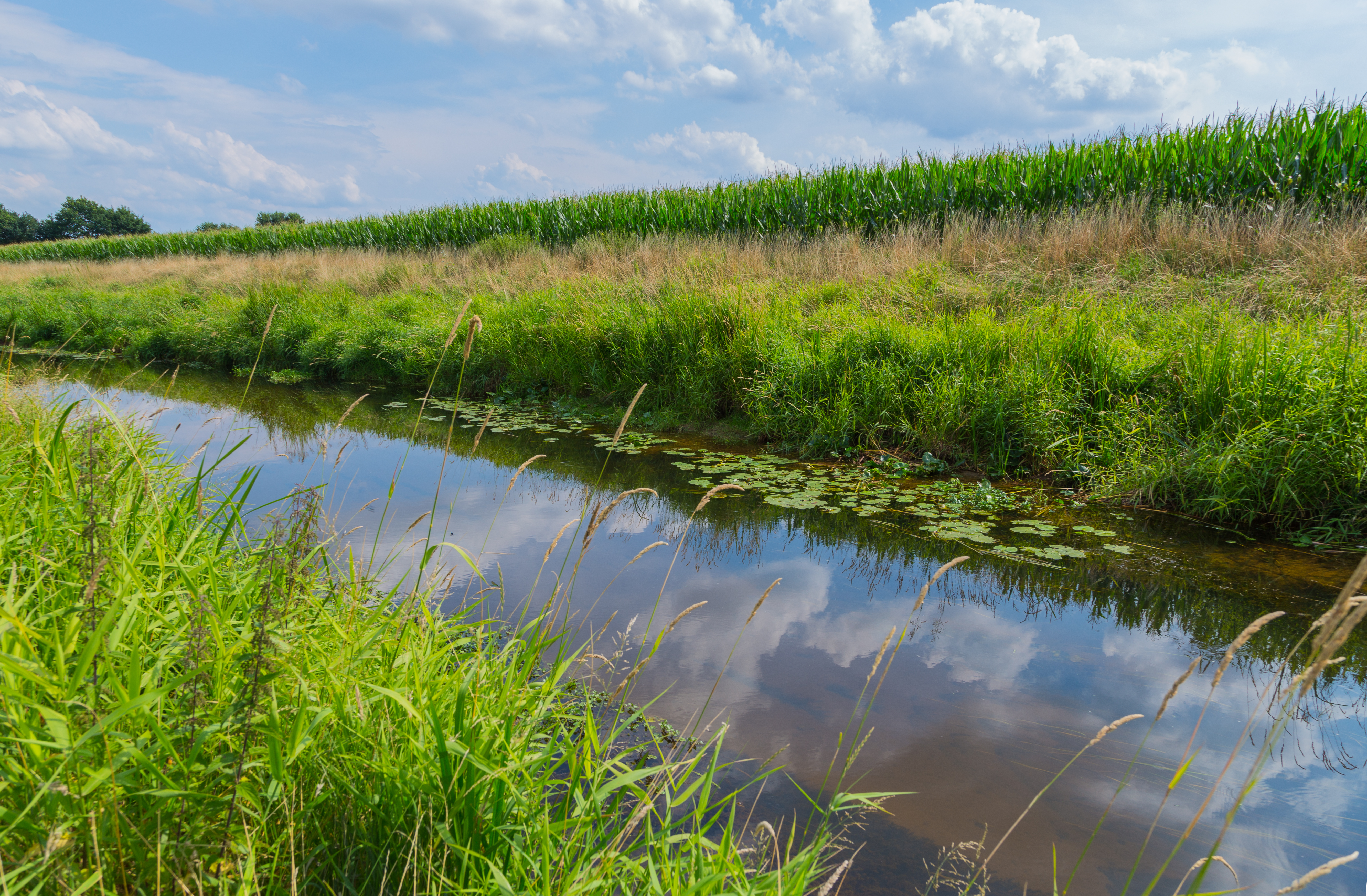 The river Hopstener Aa in Hopsten, Kreis Steinfurt, North Rhine-Westphalia, Germany.